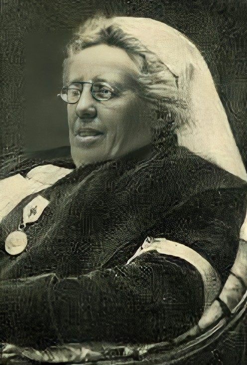 Jeanne Macherez photographiée en septembre 1914 (le 23?). Carte postale ancienne tombée dans le domaine public